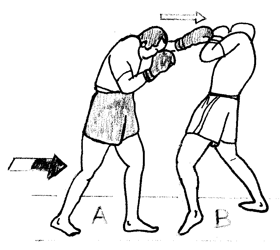 crouch1.jpg